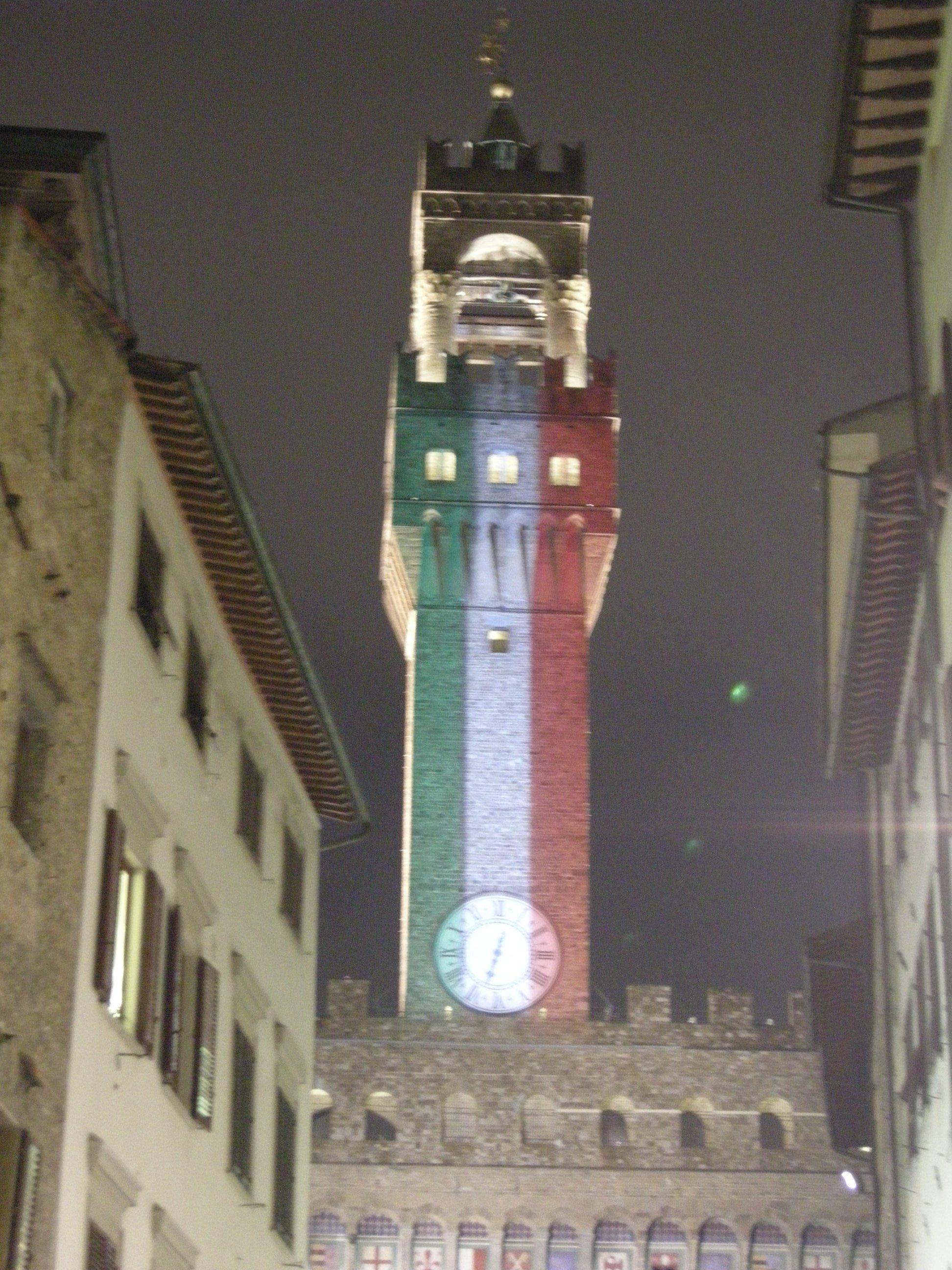 Firenze, serata tricolore, palazzo vecchio